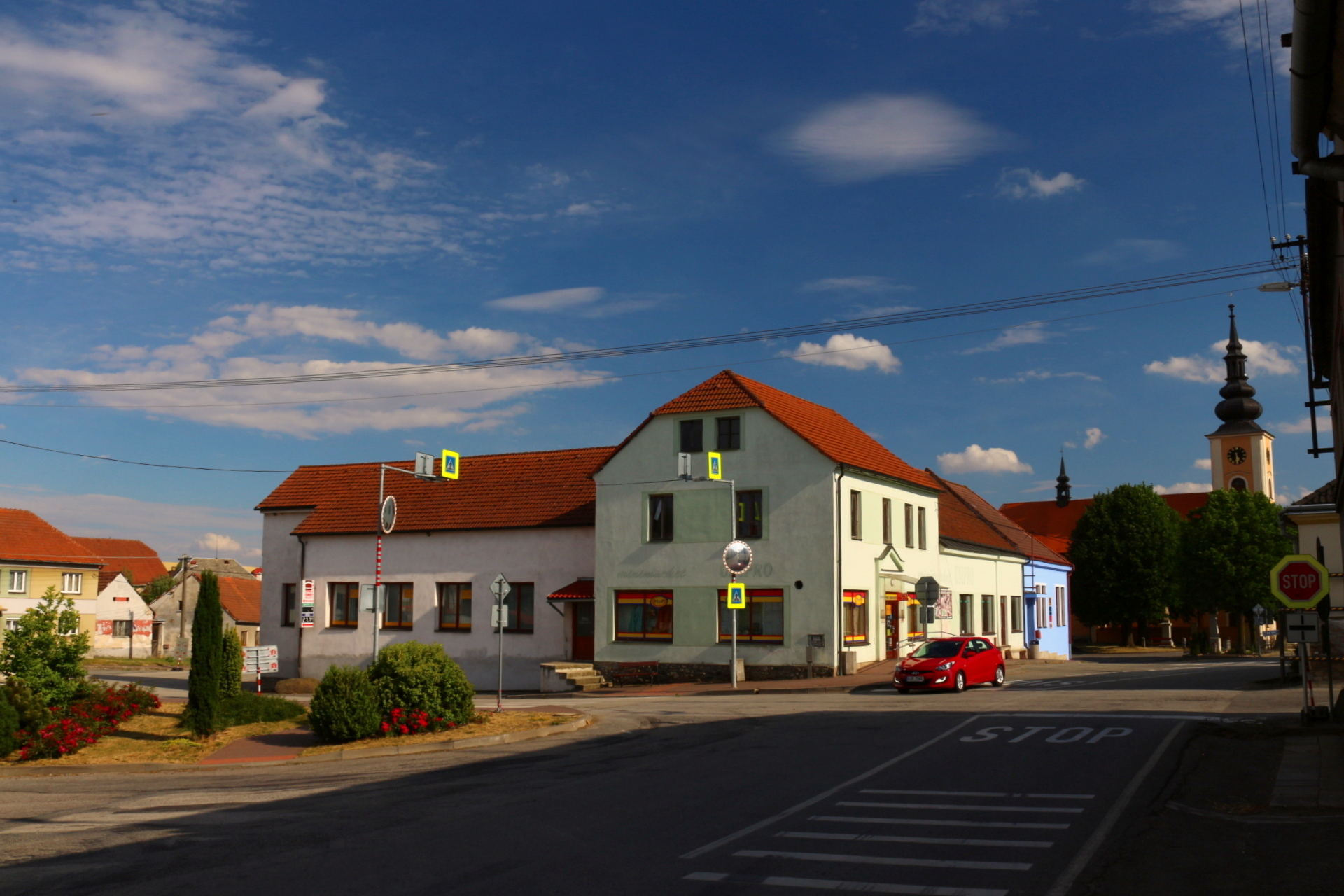 Stará Říše, střed obce